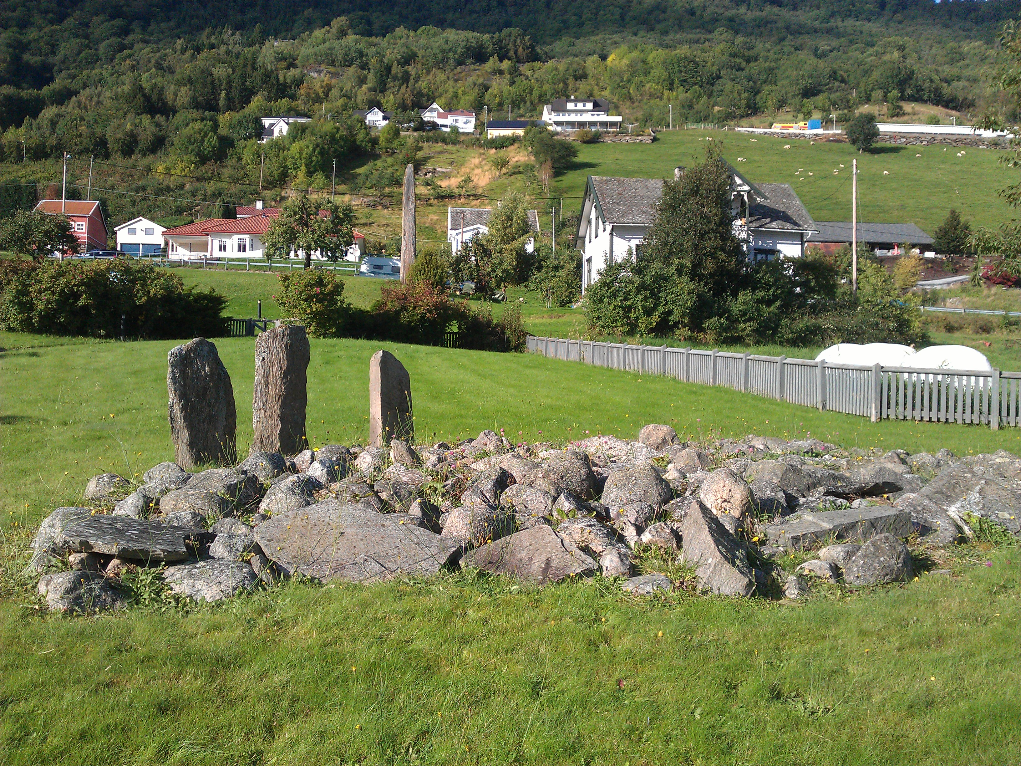 Dette er ei av fleire gravrøyser som vart avdekka på 1990-talet. Fleire rike funn vitnar om at det har budd mektige folk på tufta heilt frå bronsealderen. I Baldershagen finn ein også bautasteinen kalla Baldersteinen. Ved denne gravrøysa er det reist tre steinar som er funne i området.